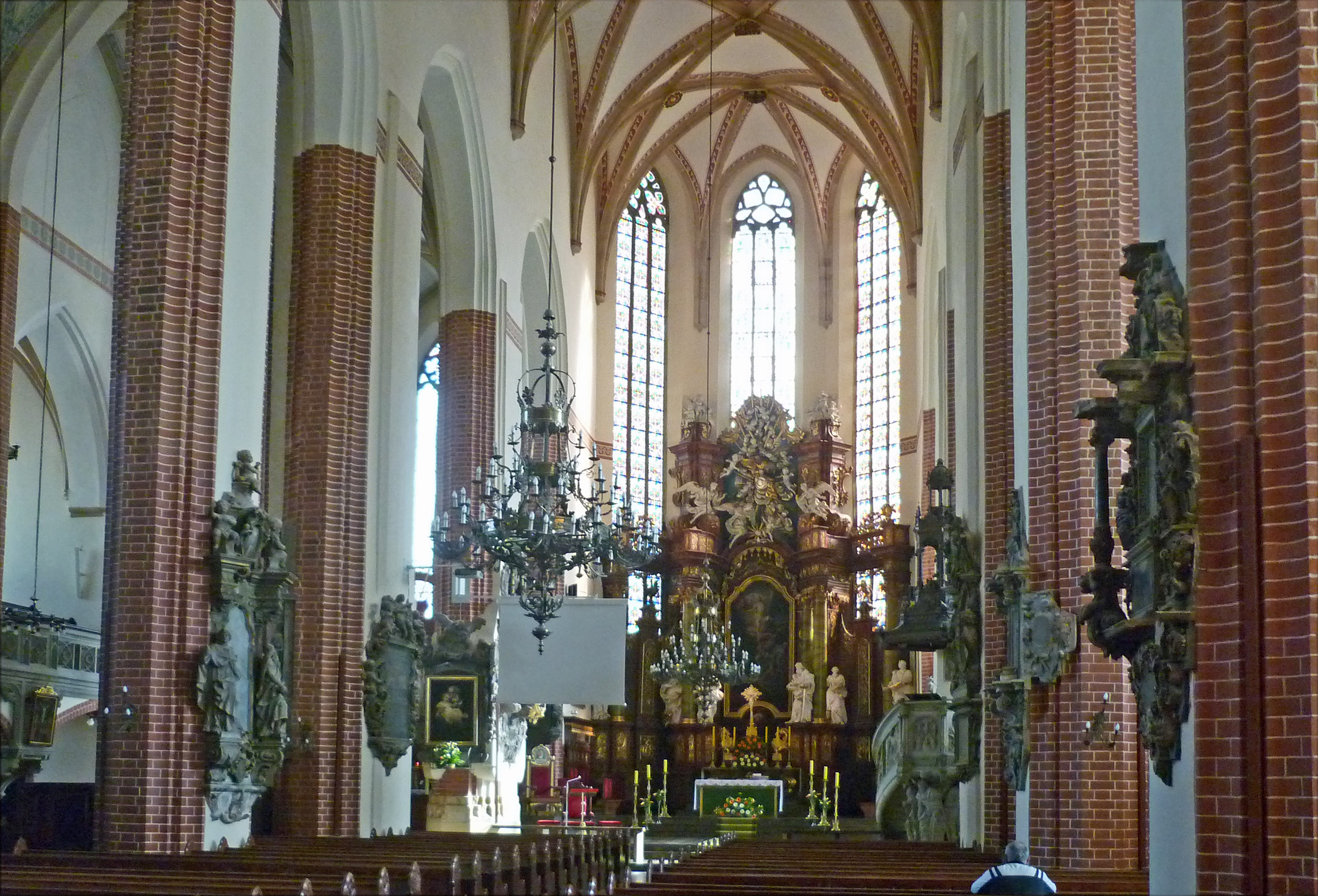 Kathedrale St. Peter und Paul in Liegnitz/Legnica